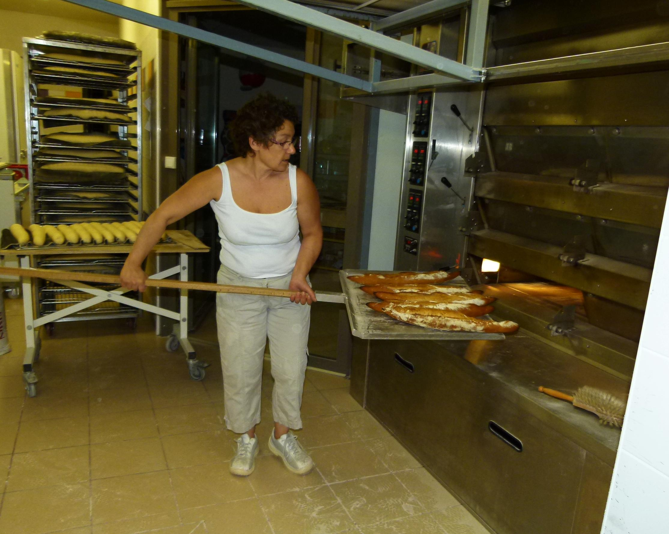 Défournement. Boulangerie La Belle Marianne Boutiers 16100 France